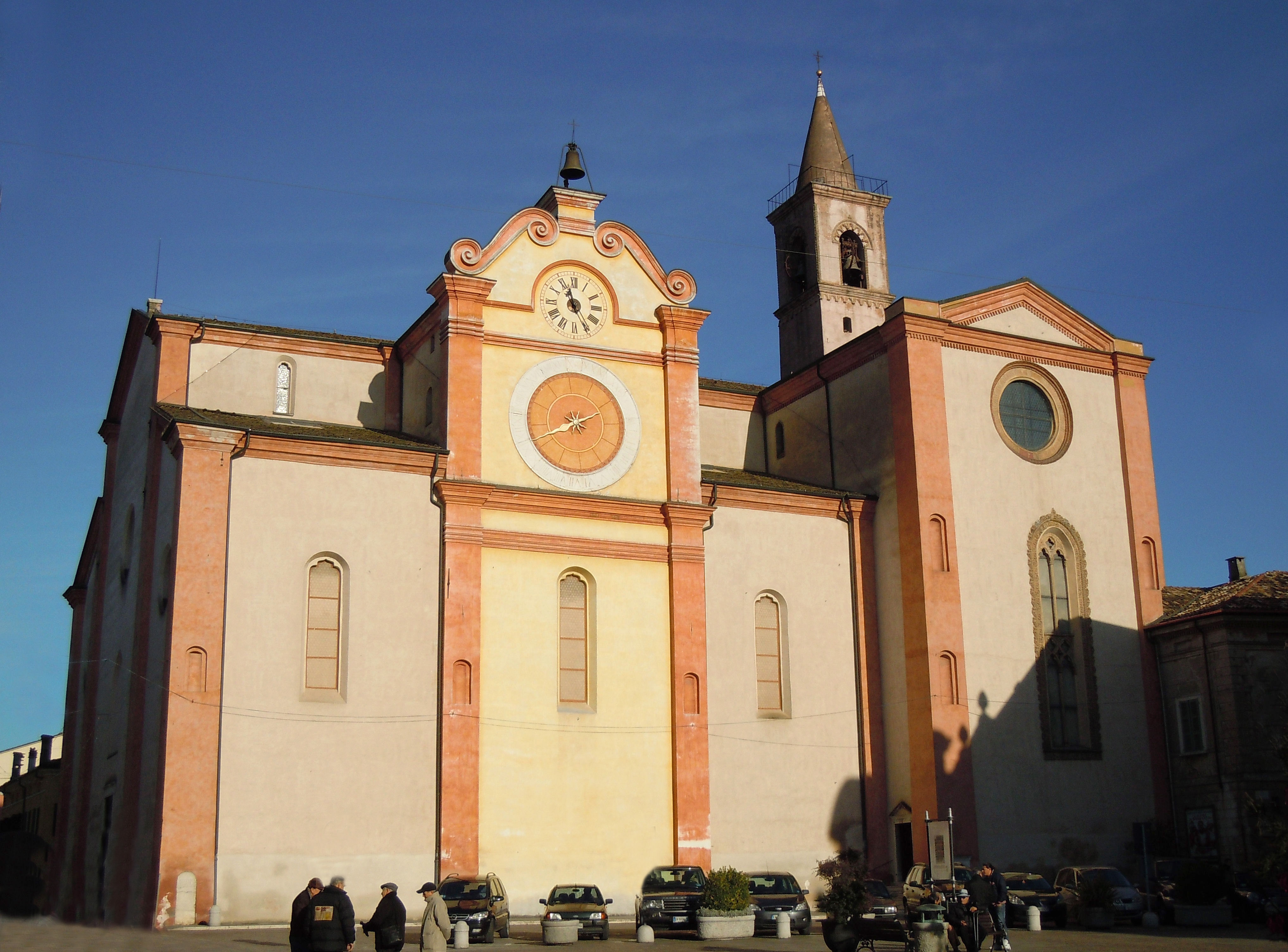 Asola, cattedrale di S. Andrea.